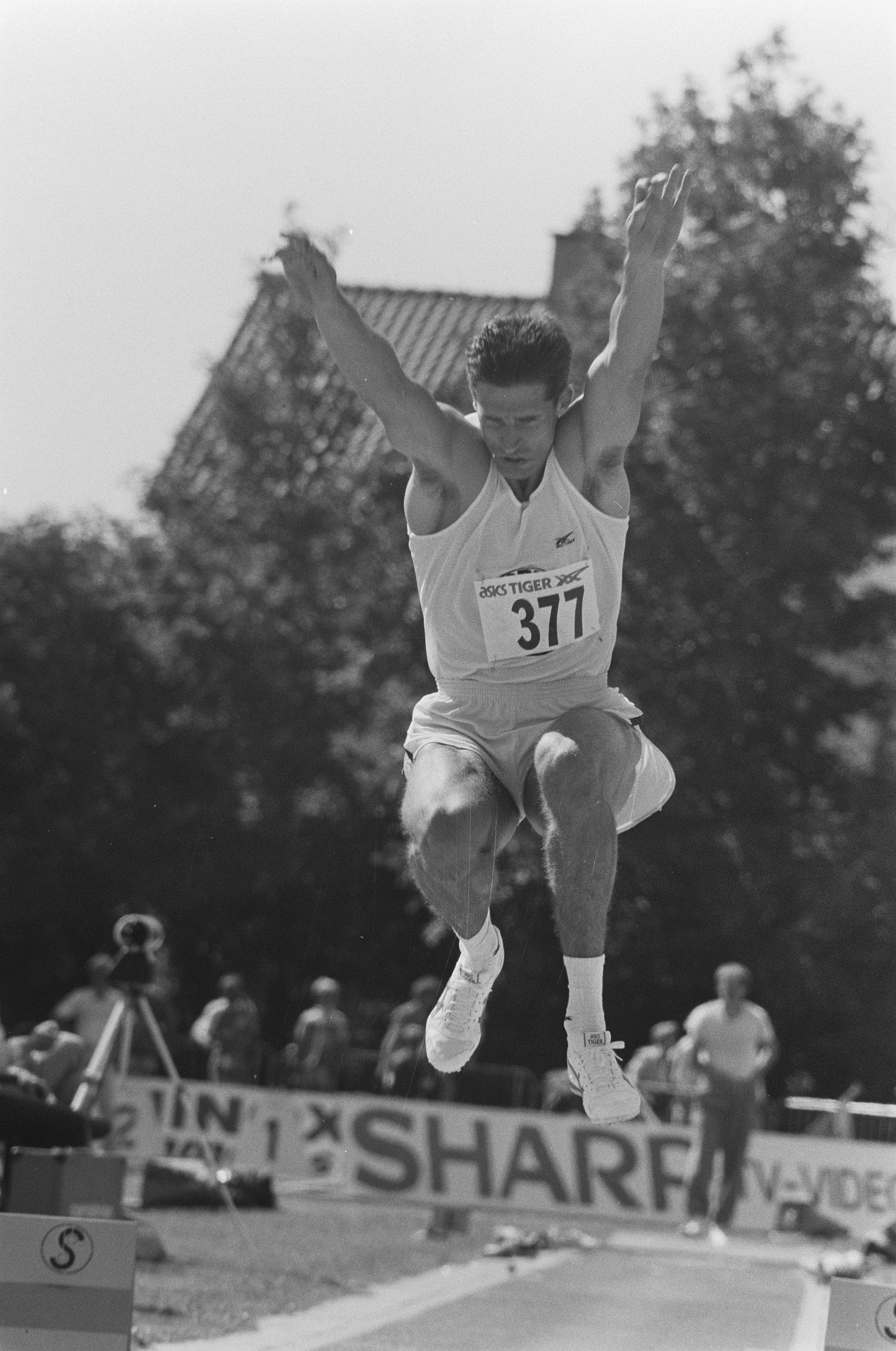 Collectie / Archief : Fotocollectie Anefo Reportage / Serie : [ onbekend ] Beschrijving : NK atletiek; verspringer Frans Maas (no. 377) Datum : 12 juli 1987 Trefwoorden : atletiek Persoonsnaam : Frans Maas Fotograaf : Bogaerts, Rob / Anefo Auteursrechthebbende : Nationaal Archief Materiaalsoort : Negatief (zwart/wit) Nummer archiefinventaris : bekijk toegang 2.24.01.05 Bestanddeelnummer : 934-0317